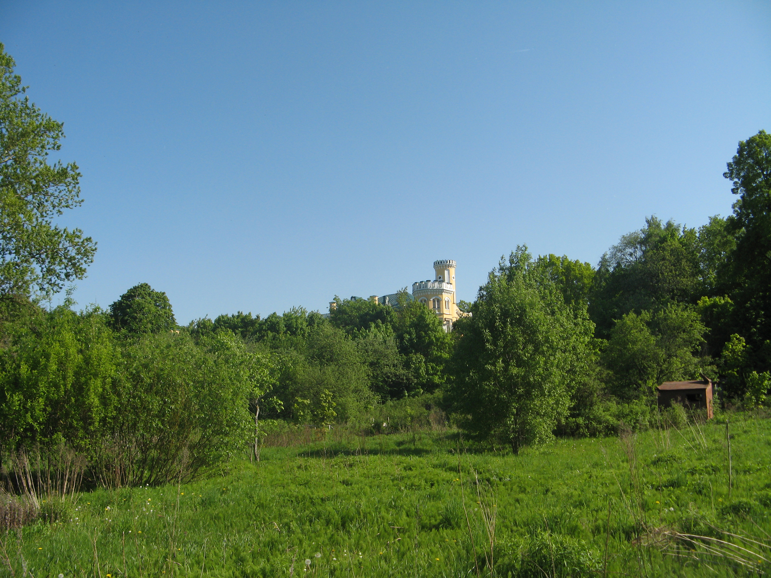 Львовский дворец. Парк с гидросистемой (три пруда): Нижняя дорога, Стрельна, Петродворцовый район, Санкт-Петербург